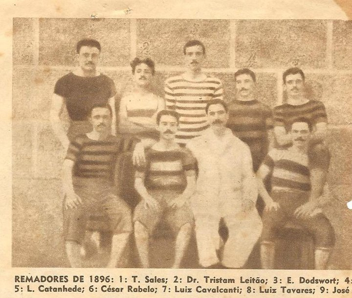 Les membres fondateurs du Clube de Regatas do Flamengo en 1896.